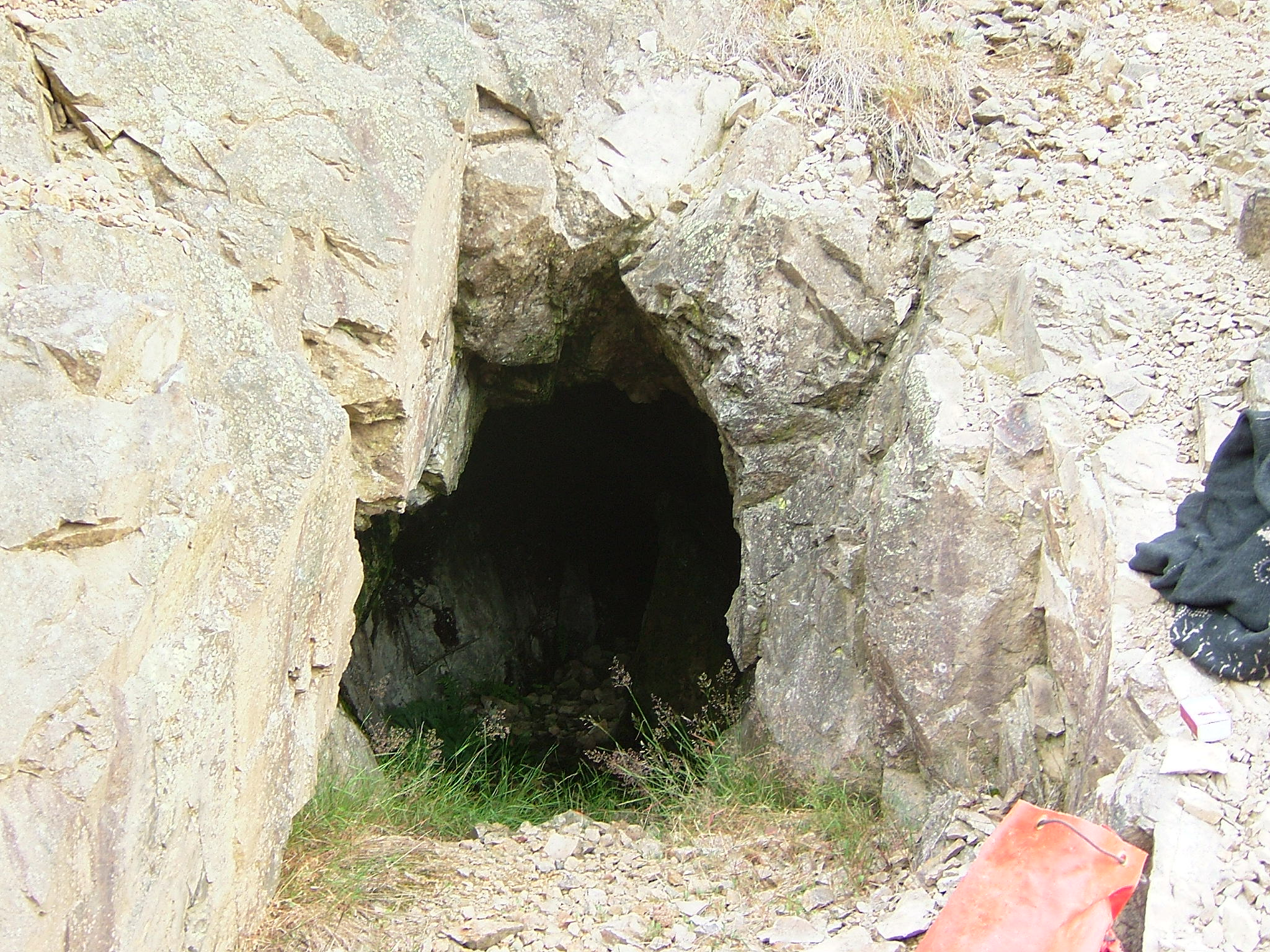 Mine de Jacques Coeur située à Joux dans le Rhône, France